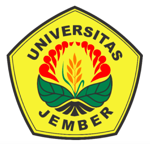 Logo resmi Universitas Jember sesuai dengan Statuta Universitas Jember tahun 2020